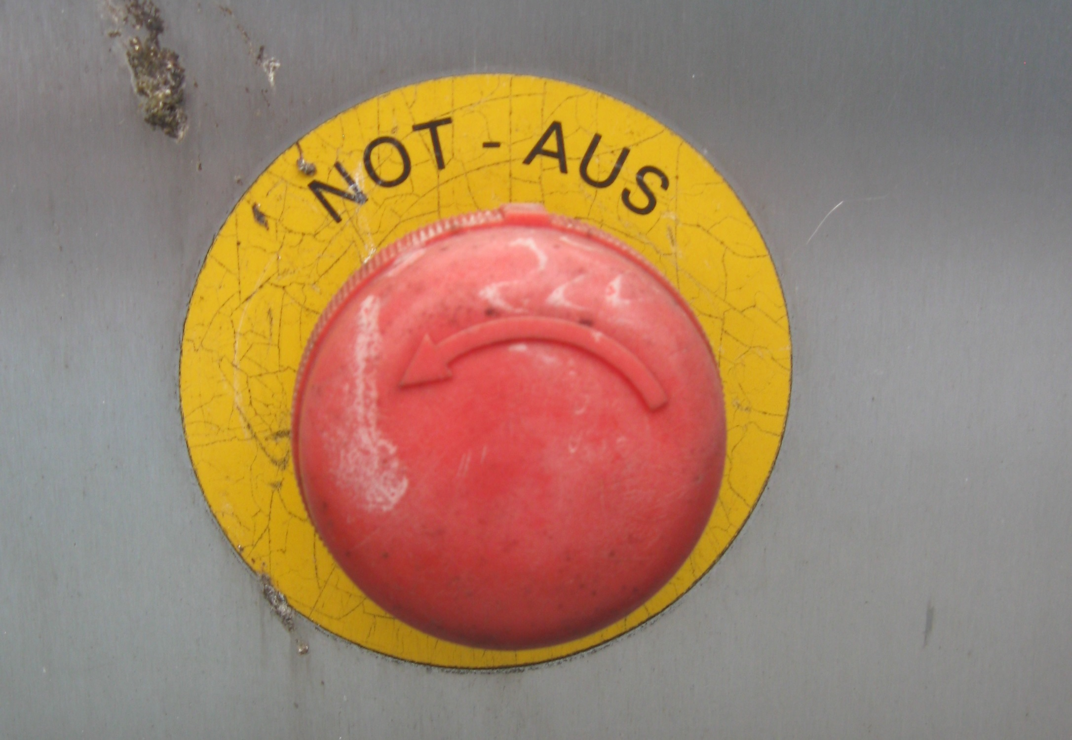 Notausschalter am Osttor der Zentralen Feuer- und Rettungswache 2 (ZFRW Gelsenkirchen) an der Seestraße in Gelsenkirchen.